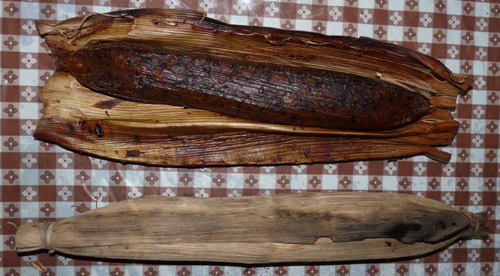 ചുട്ടെടുത്ത തെണ്ടും അത് പൊതിയിൽനിന്ന് പൊളിച്ചുവച്ചതും